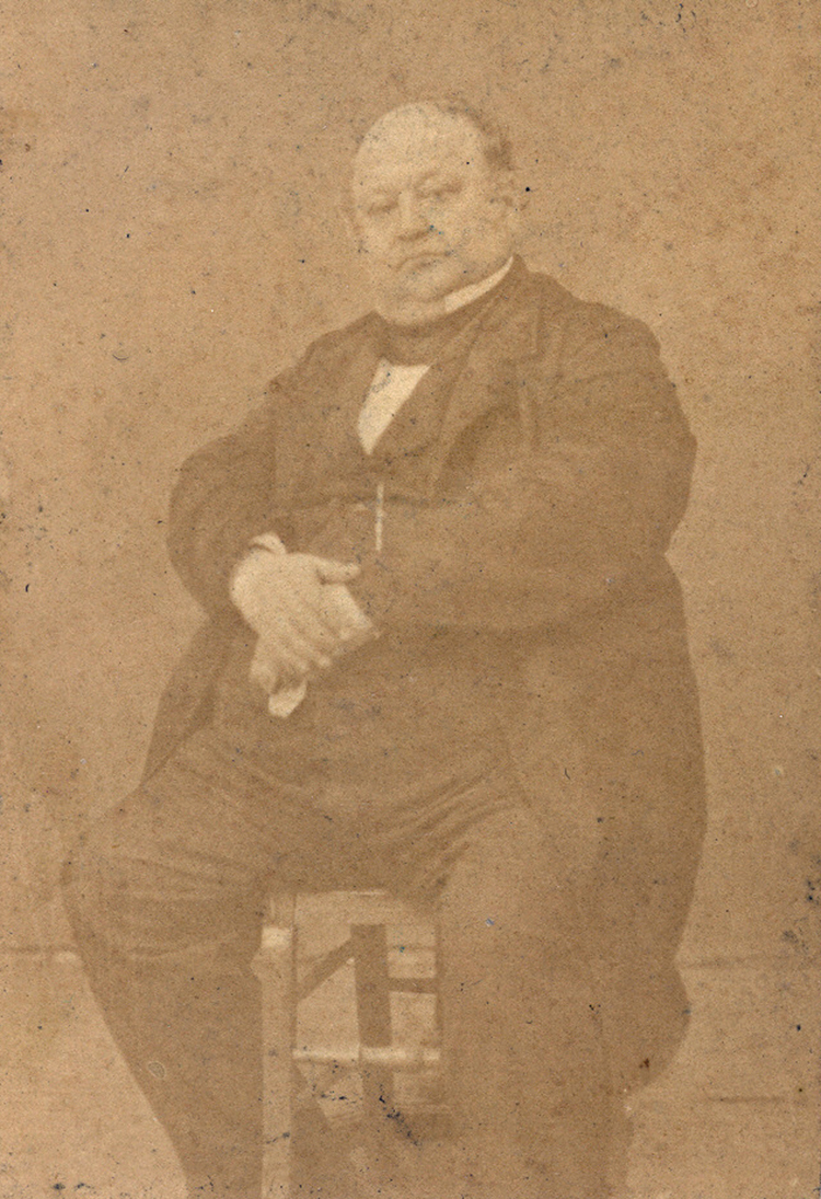 Portret van Charles Guillon.